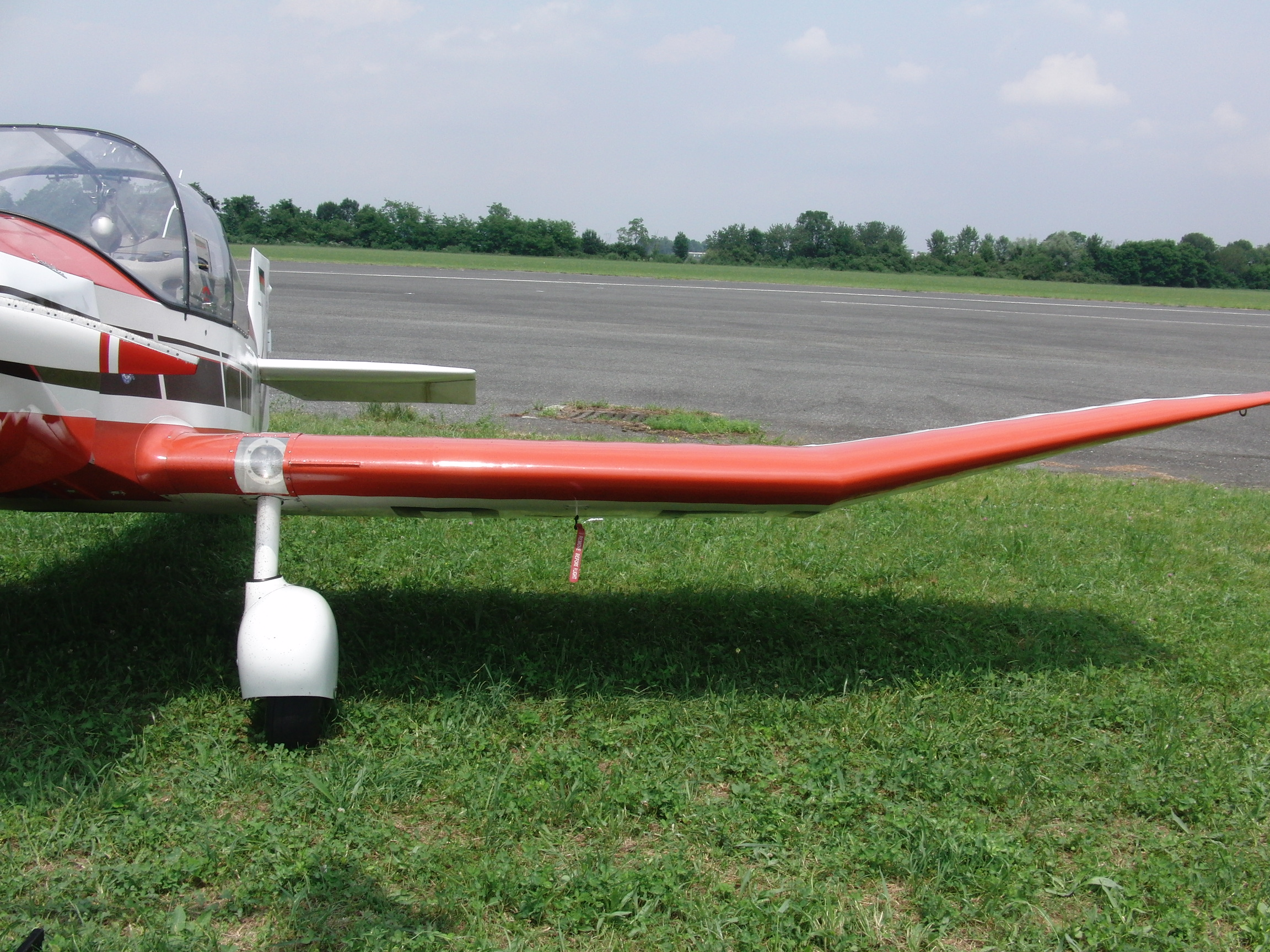 Particolare dell'ala del Wassmer Model D-120 in mostra statica al Centenario Aeroporto TorinoAeritalia 2016 - Historical Aircraft Group